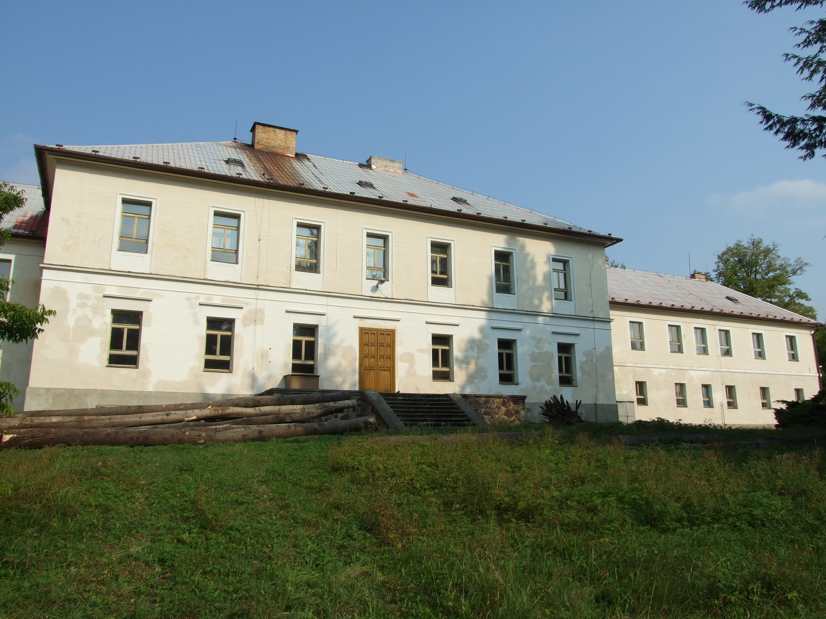 Zámek Březina z čela v zámecké zahradě, Březina 34